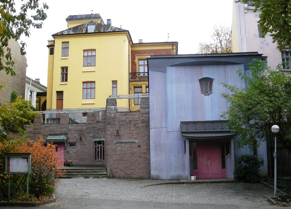 Kristensamfunnets kirke, Oscars gate 84, Oslo